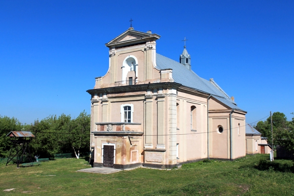 Костьол Пресвятої Діви Марії, село Тарноруда